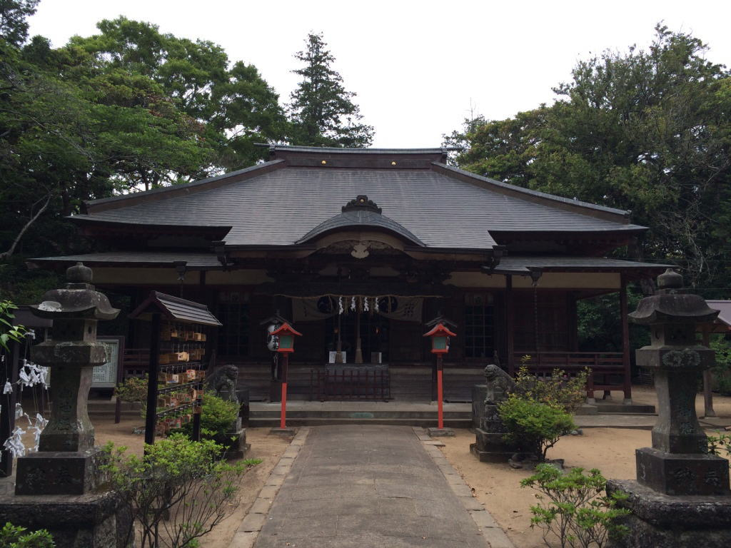 熊野神社 (横芝光町)拝殿